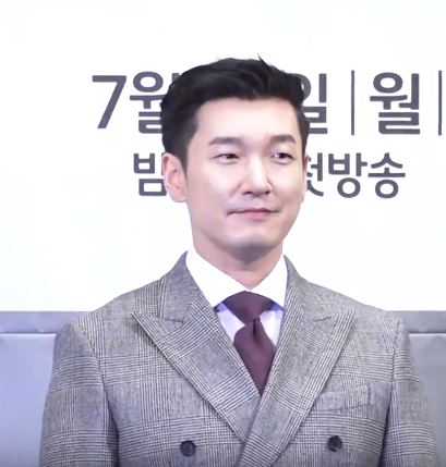 [제작발표회] 부드러운 눈빛